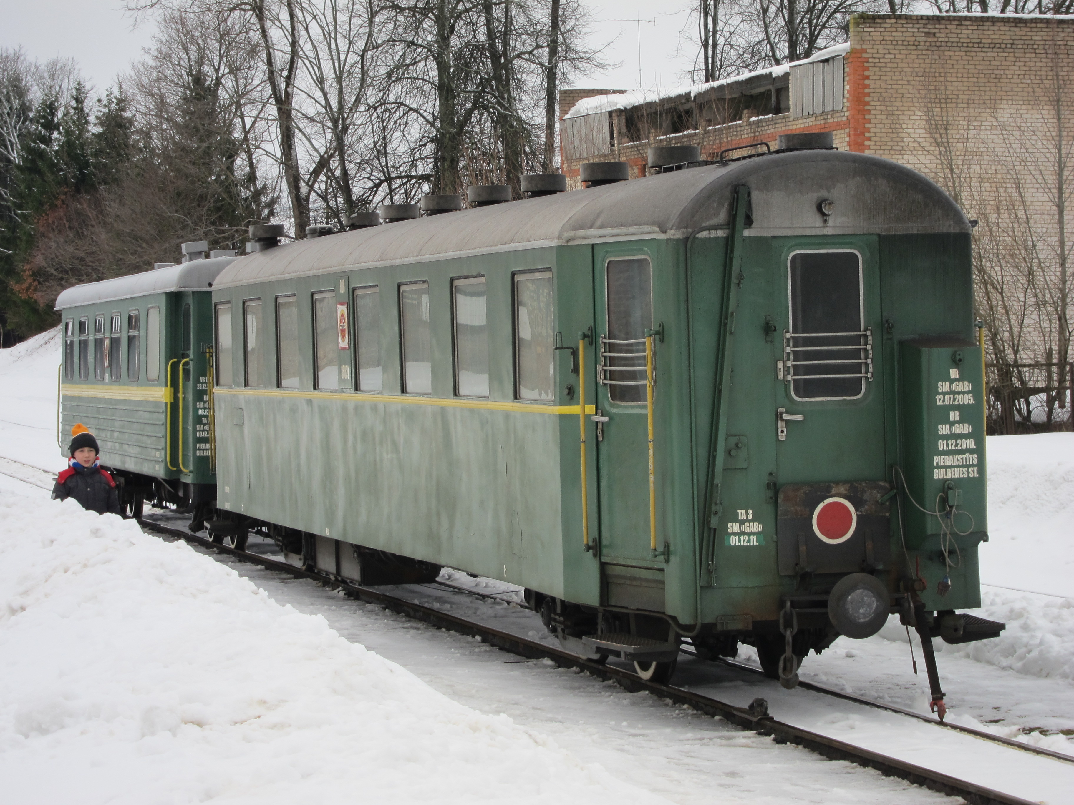 Pasažieru vagoni Alūksnes stacijā